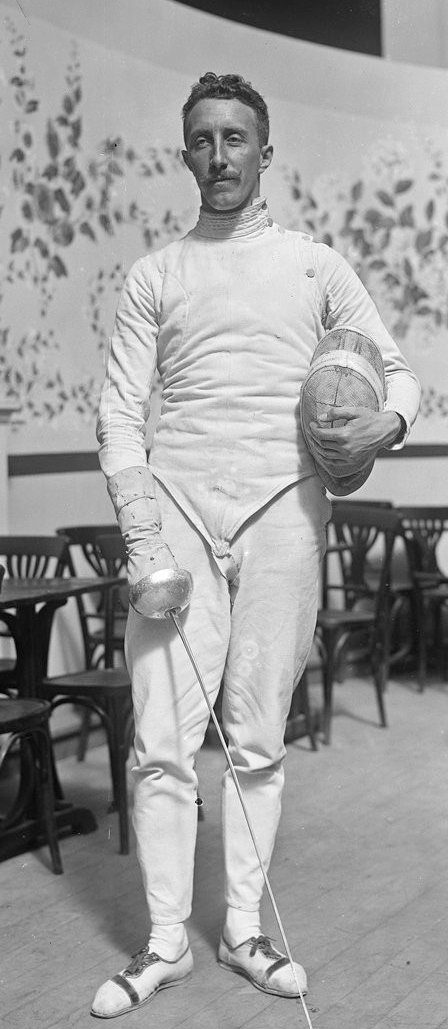 Feyerick, Belge [escrimeur, Luna Park, championnat d'Europe d'escrime, 16-17 juin 1922] : [photographie de presse] / [Agence Rol]